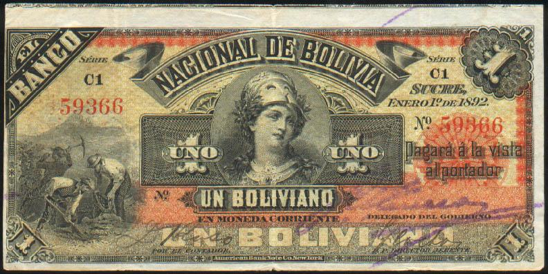 1 боливиано 1892. Боливия. Аверс.